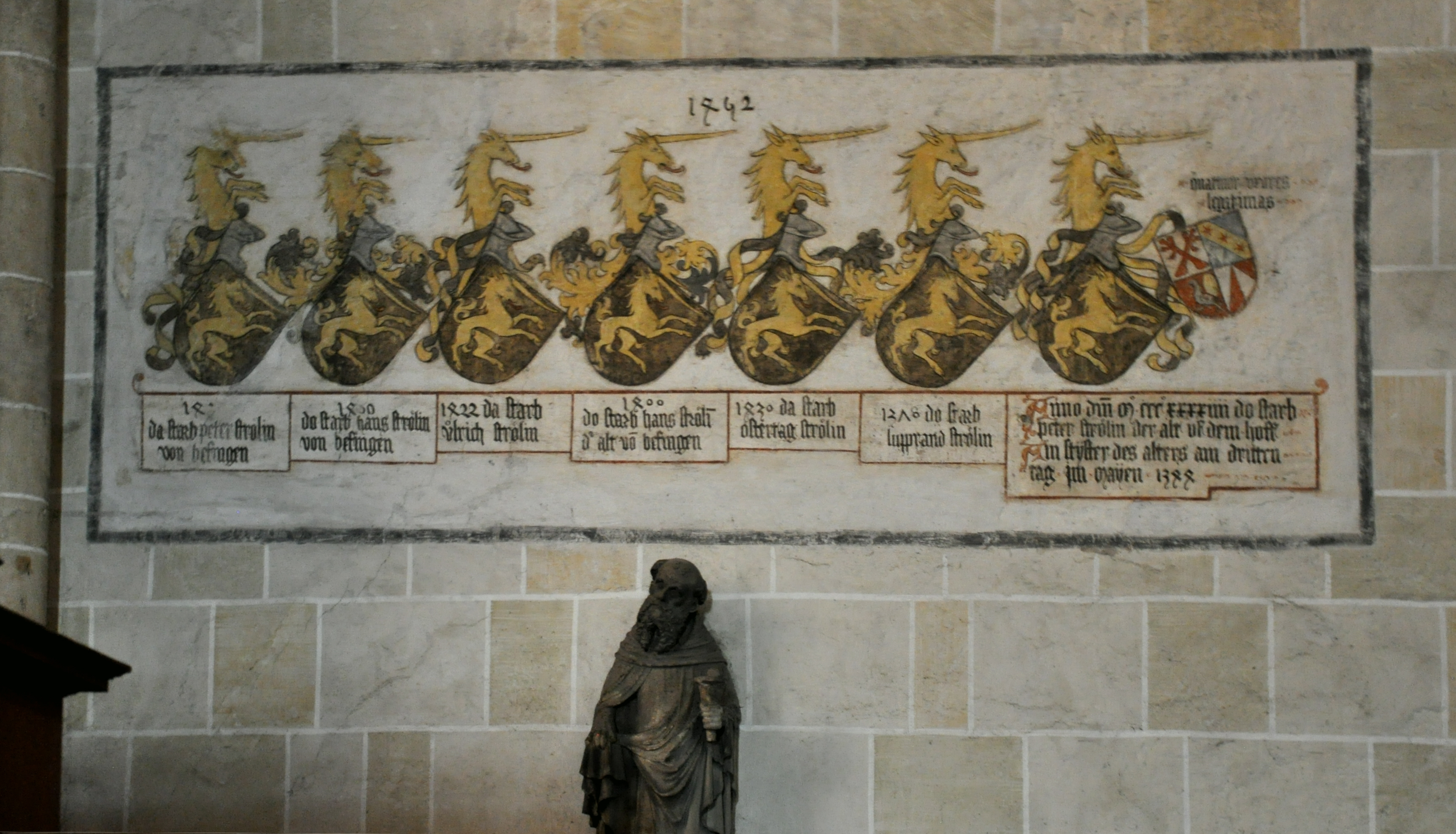 Ulm, Ulmer Münster, gemalte Totenschilde der Familie Strölin, 1452; neben dem 1. Wappen ganz rechts auch ein Schild mit den 4 Wappen der Ehefrauen des Peter Strölin † 1344, aus den Familien Suntheim, Güß, Halle, Steinhauser); Fresko an der nördlichen Querwand neben dem Eingang zur Neithartkapelle